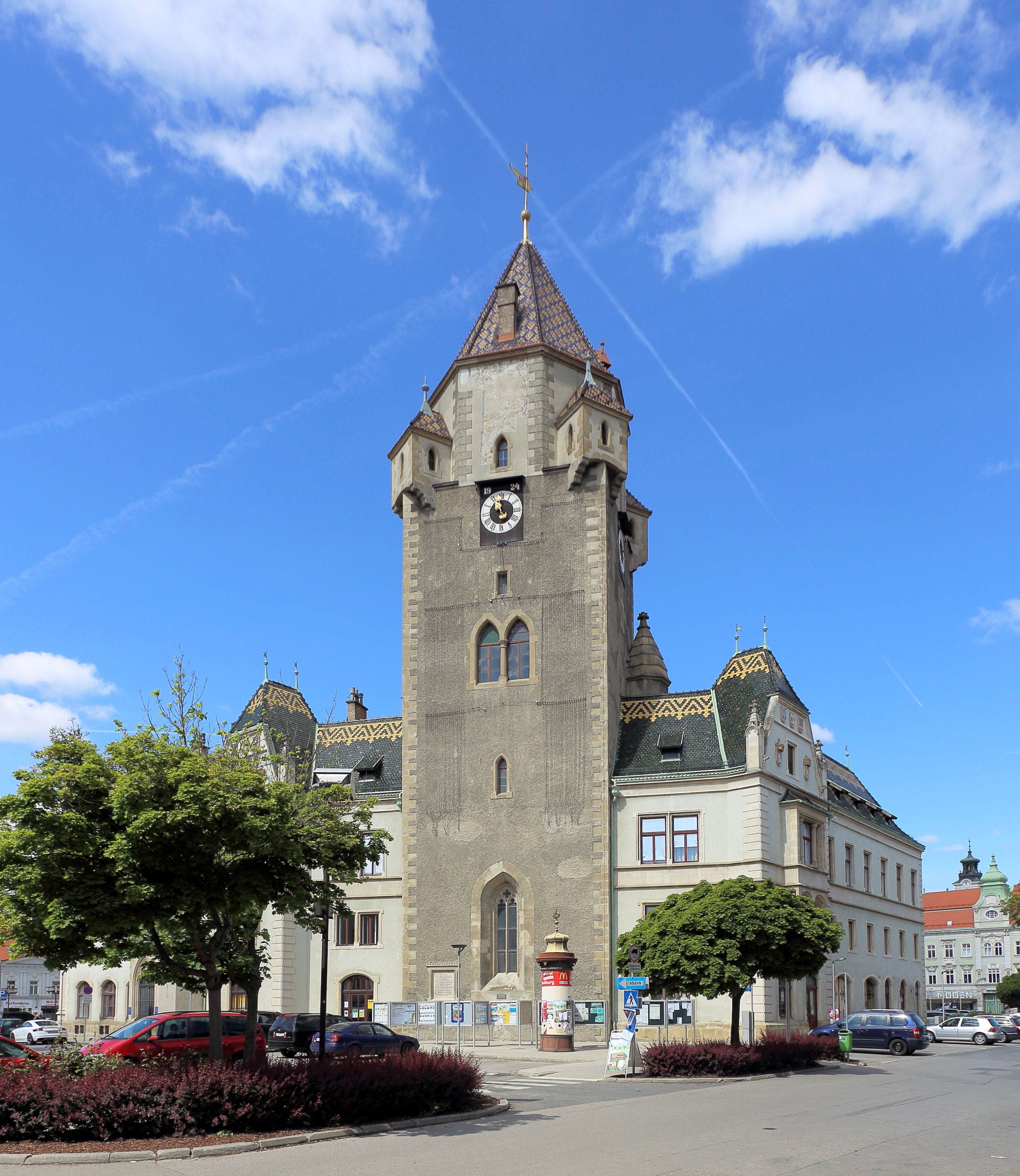 Ostansicht des Stadtturmes der niederösterreichischen Bezirkshauptstadt Korneuburg. Von 1440 bis 1447 über der Apsis einer Kirche errichtet, die 1894/95 abgetragen wurde und an dessen Stelle man das neugotische Rathaus nach Plänen des Architekten Max Conrad Kropf (1858–1940) baute.